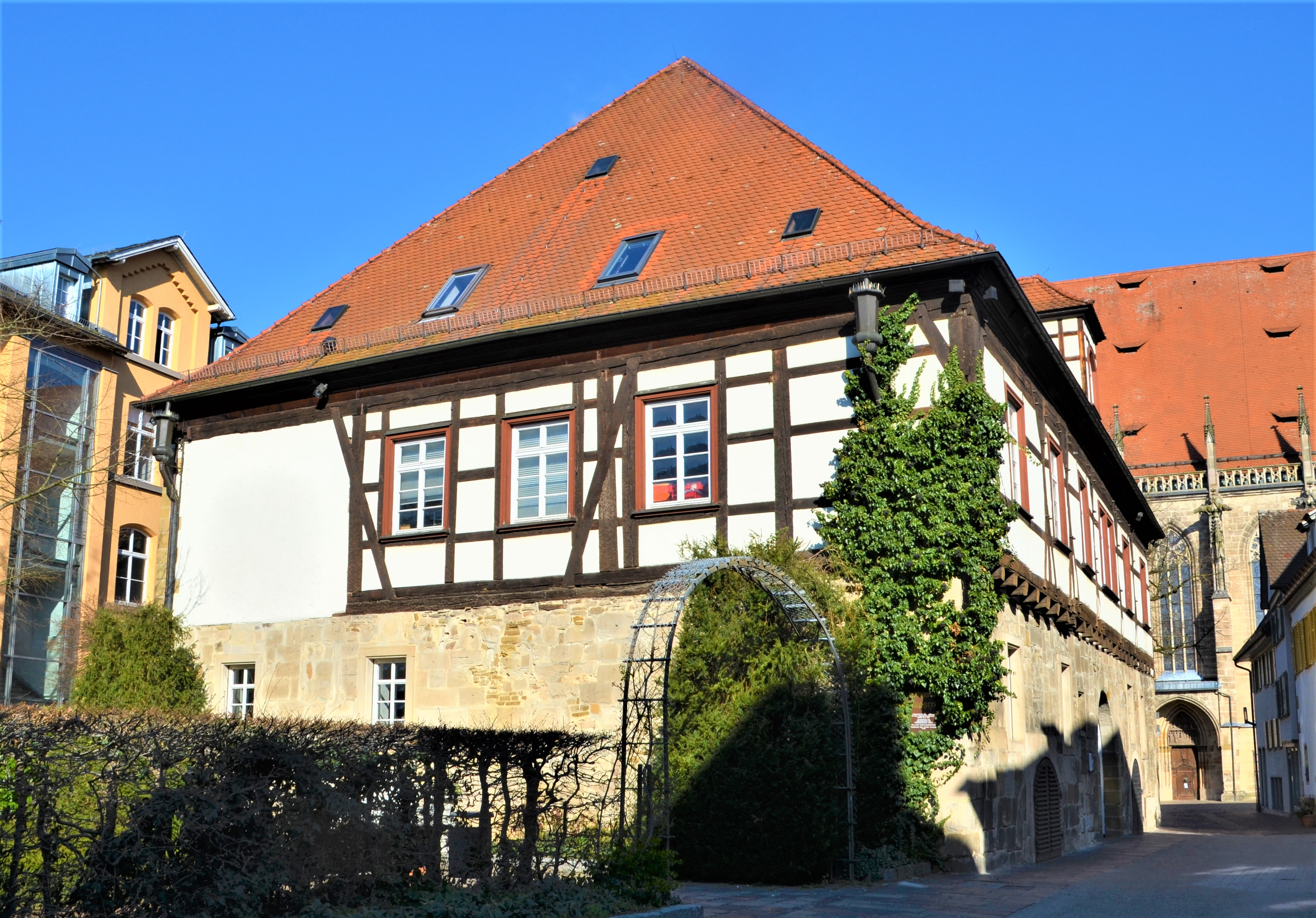 Fuggerei in Schwäbisch Gmünd von Süden aus der Münstergasse heraus aufgenommen